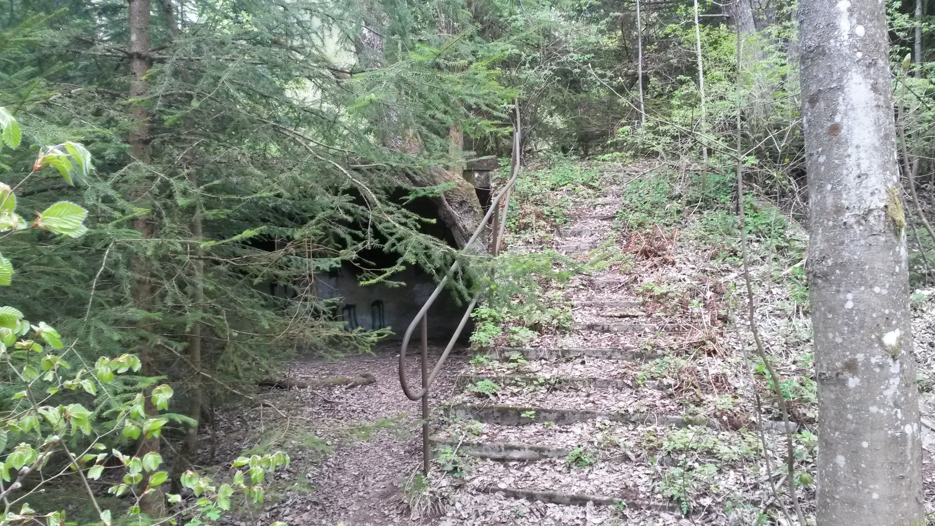 Ruine des Alpenstrandbades Semmering, erbaut 1932, Aufgang zur oberen Terrasse (Ostseite), links die Ostwand des Fitnessraumes.